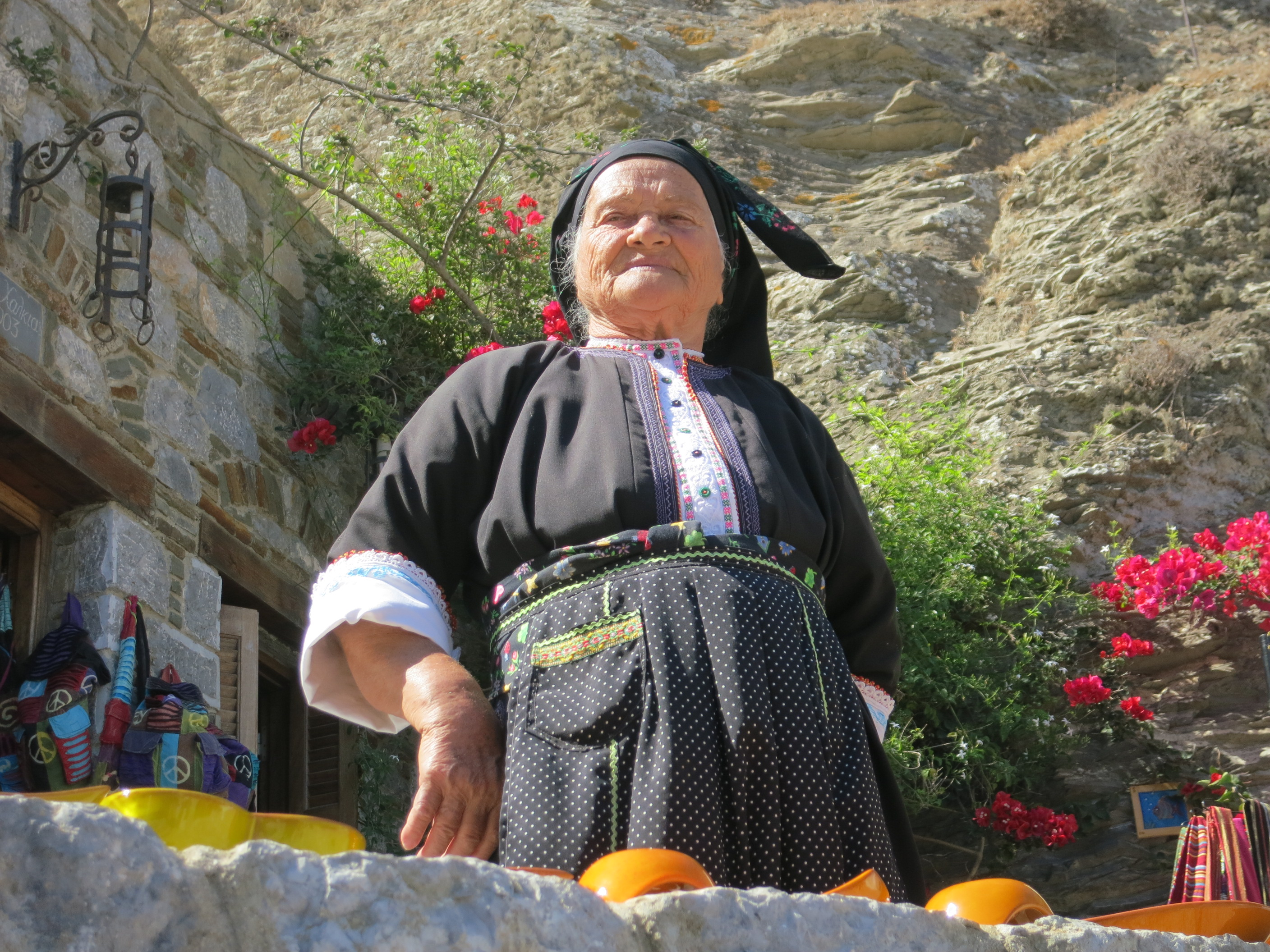 Traditionell klädsel, kvinna, Olympos, Karpathos, Grekland